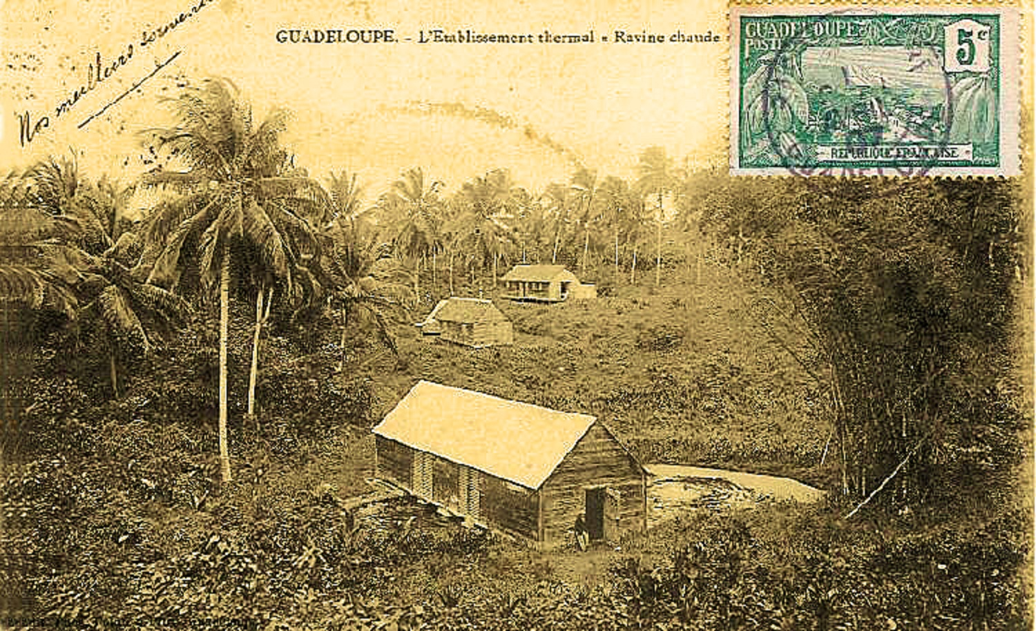 Guadeloupe établissement thermal